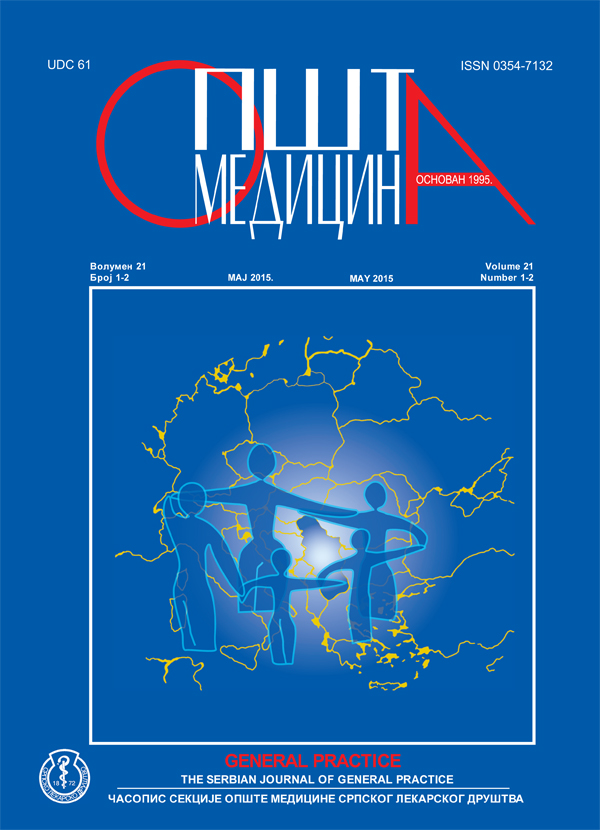 Корица часописа „Општа медицина“